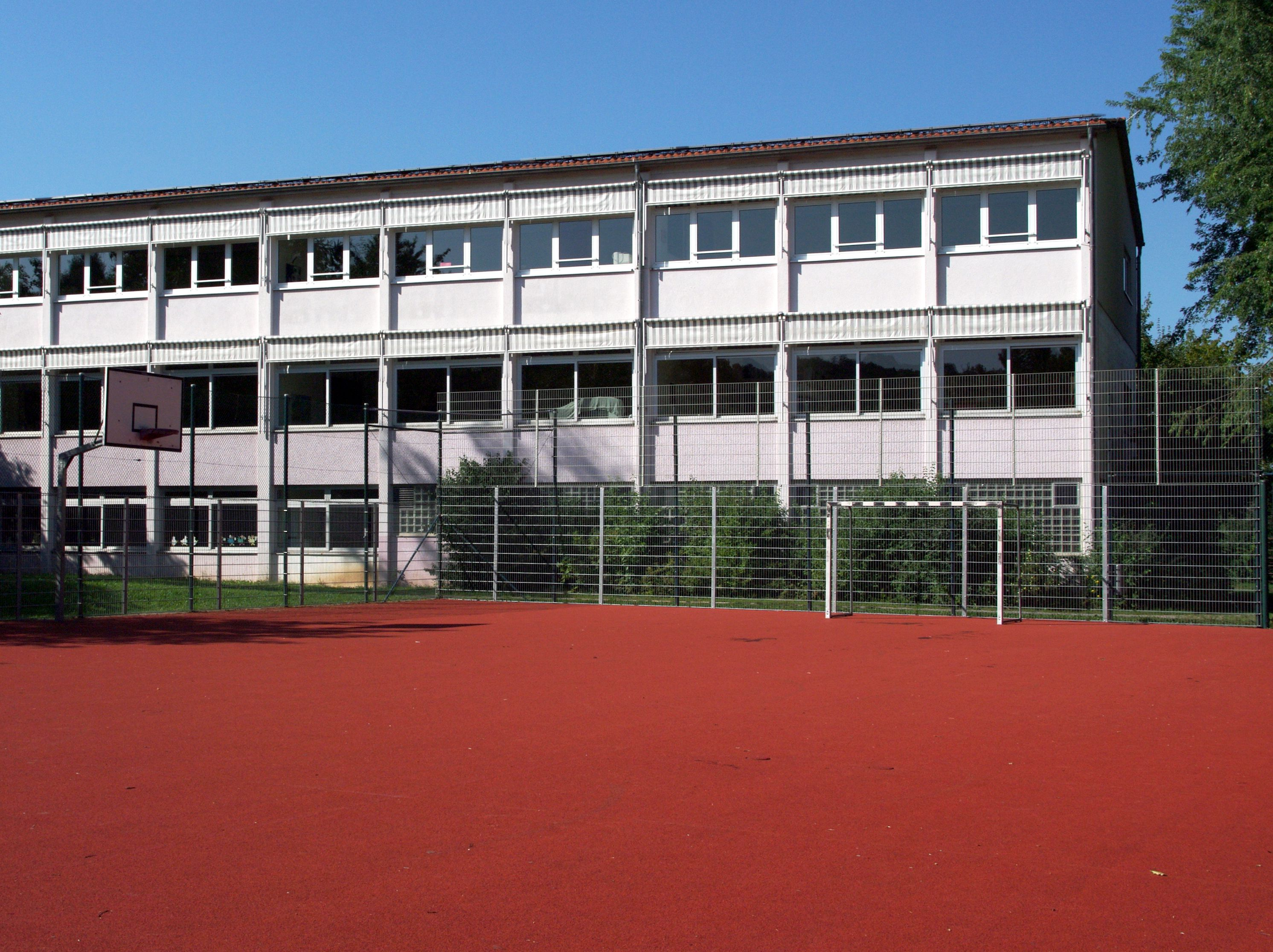 Bau der Glemstal-Grundschule in Unterriexingen mit davor gelegenem Sportfeld